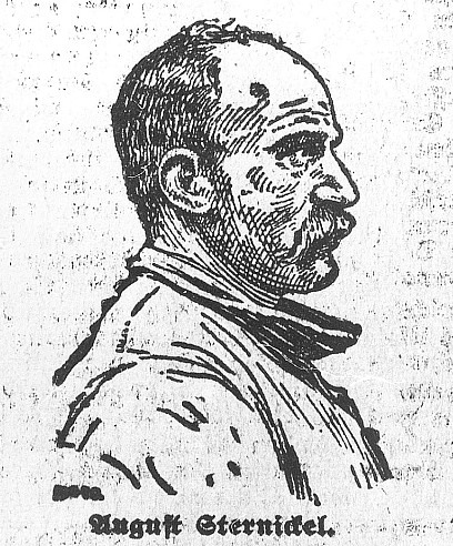 Original image description from the Deutsche Fotothek Raubmörder Sternickel, aus: Neuer Görlitzer Anzeiger, 15. Januar 1913August Sternickel